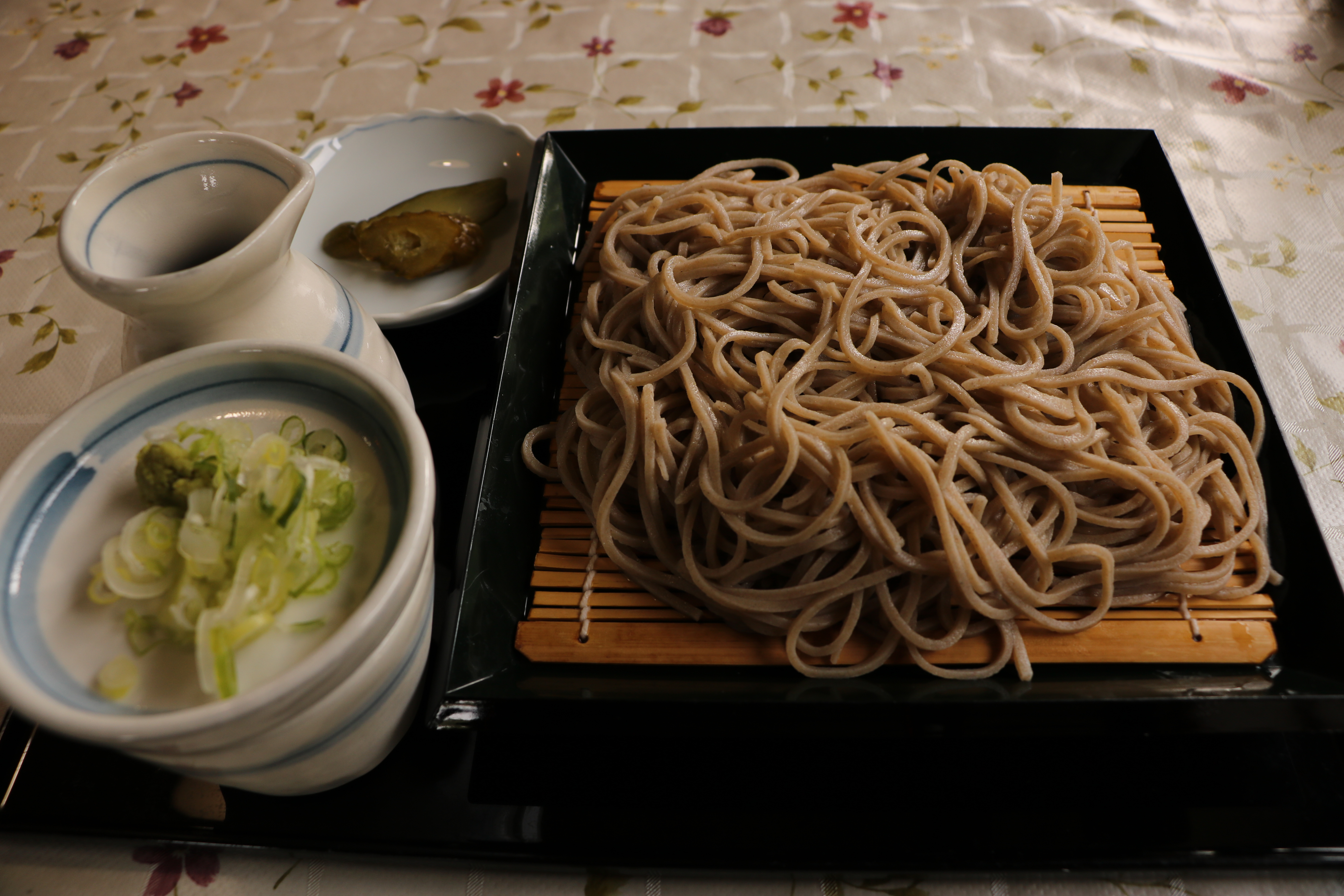 利賀そば（2017年9月4日。富山県南砺市旧利賀村、利賀そばの郷、うまいもん館にて撮影）